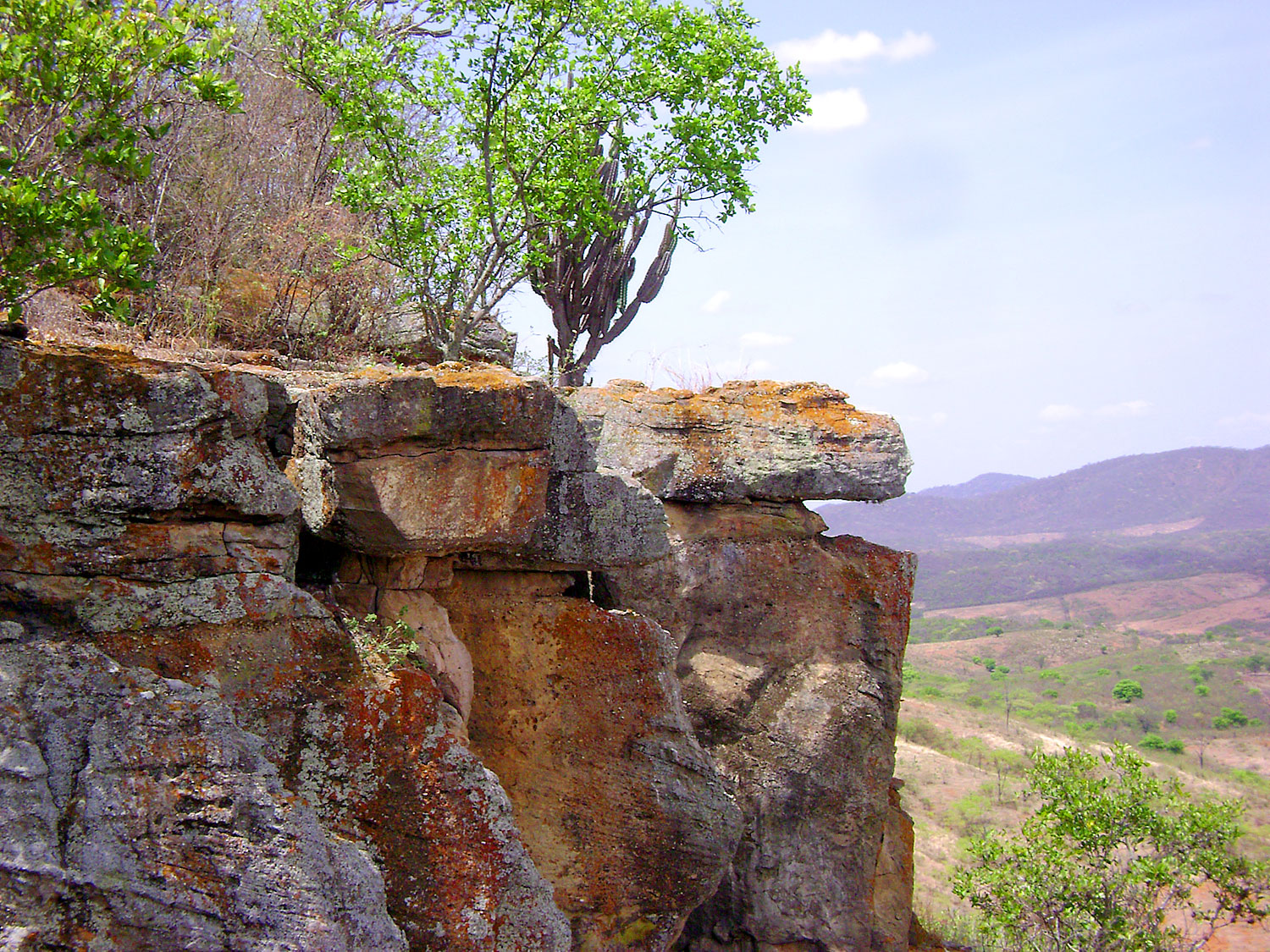 No Sertão Nordestino plantas afloram das pedras. Na estação seca a Caatinga fica com uma cor acizentada: deixam cair as folhas para economizar água até chegar a estação das chuvas. Isto se chama Sustentabilidade.